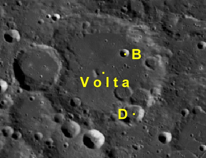 Cráter lunar Volta. Cráteres satélite. (Imagen LRO)